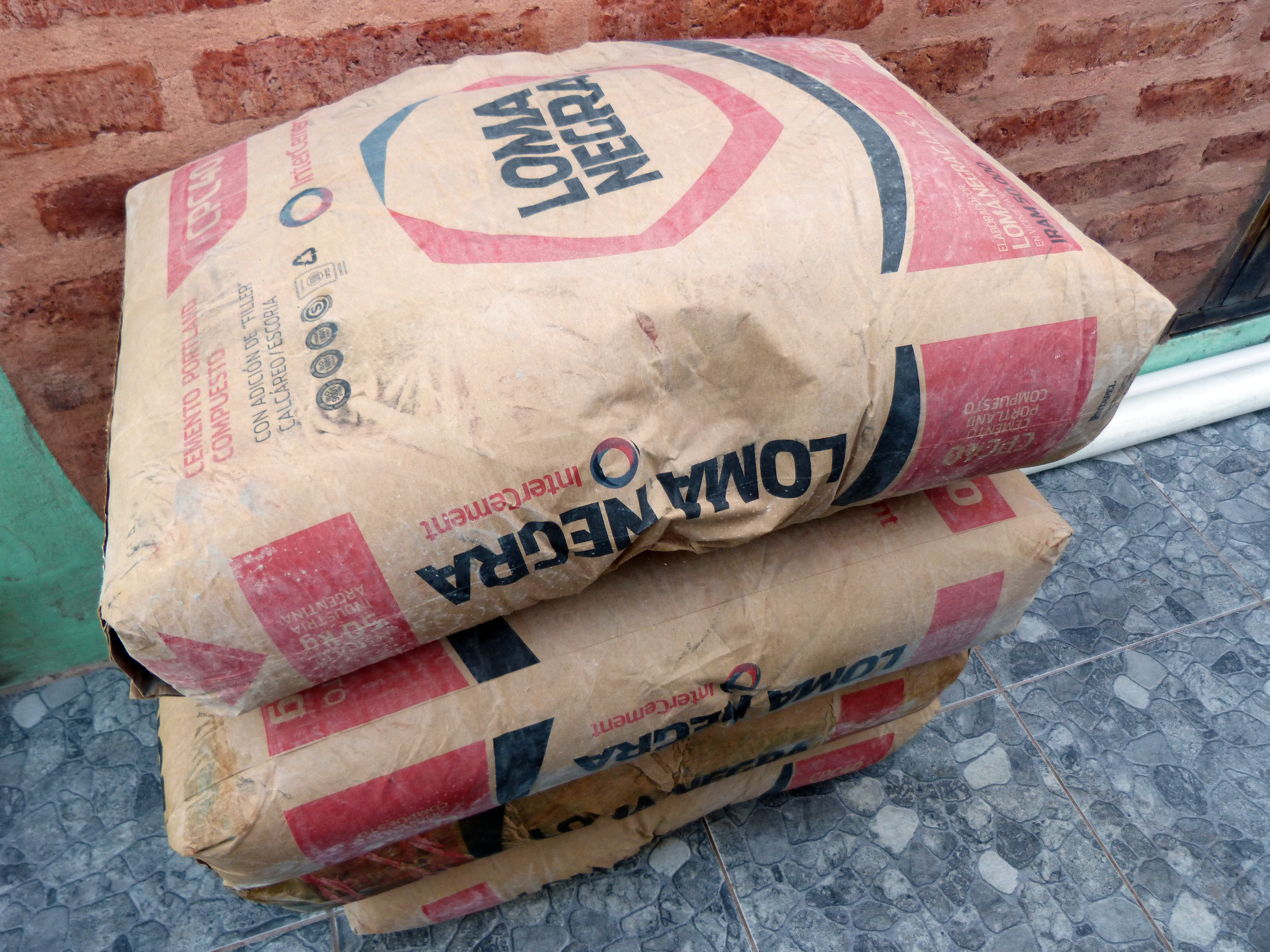 Bolsas de cemento Loma Negra